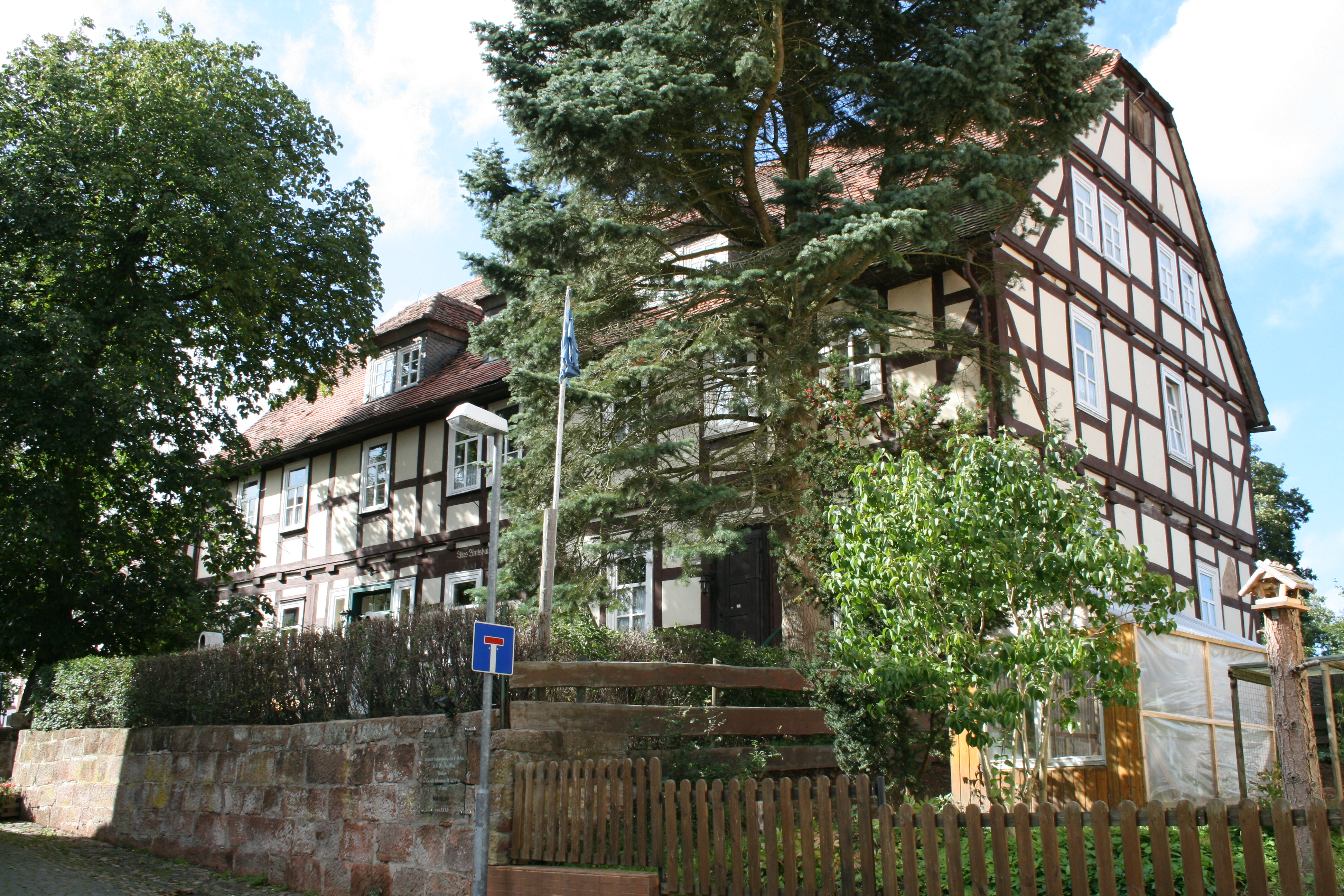 Amtsgericht und Scheune in 35119 Rosenthal, Deutschland, Adresse: Zehntstraße 12